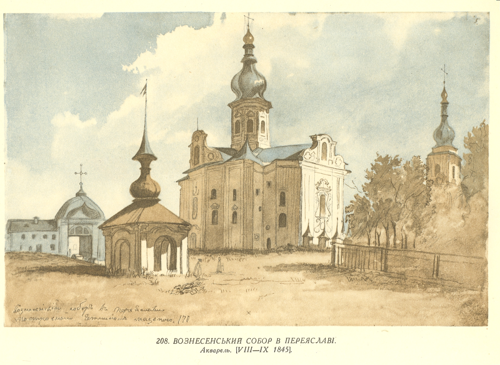 Тарас Шевченко. Повне зібрання творів в десяти томах. — К., 1961. — Т. 7: Живопис, графіка 1830-1847. — Кн. 1-2.